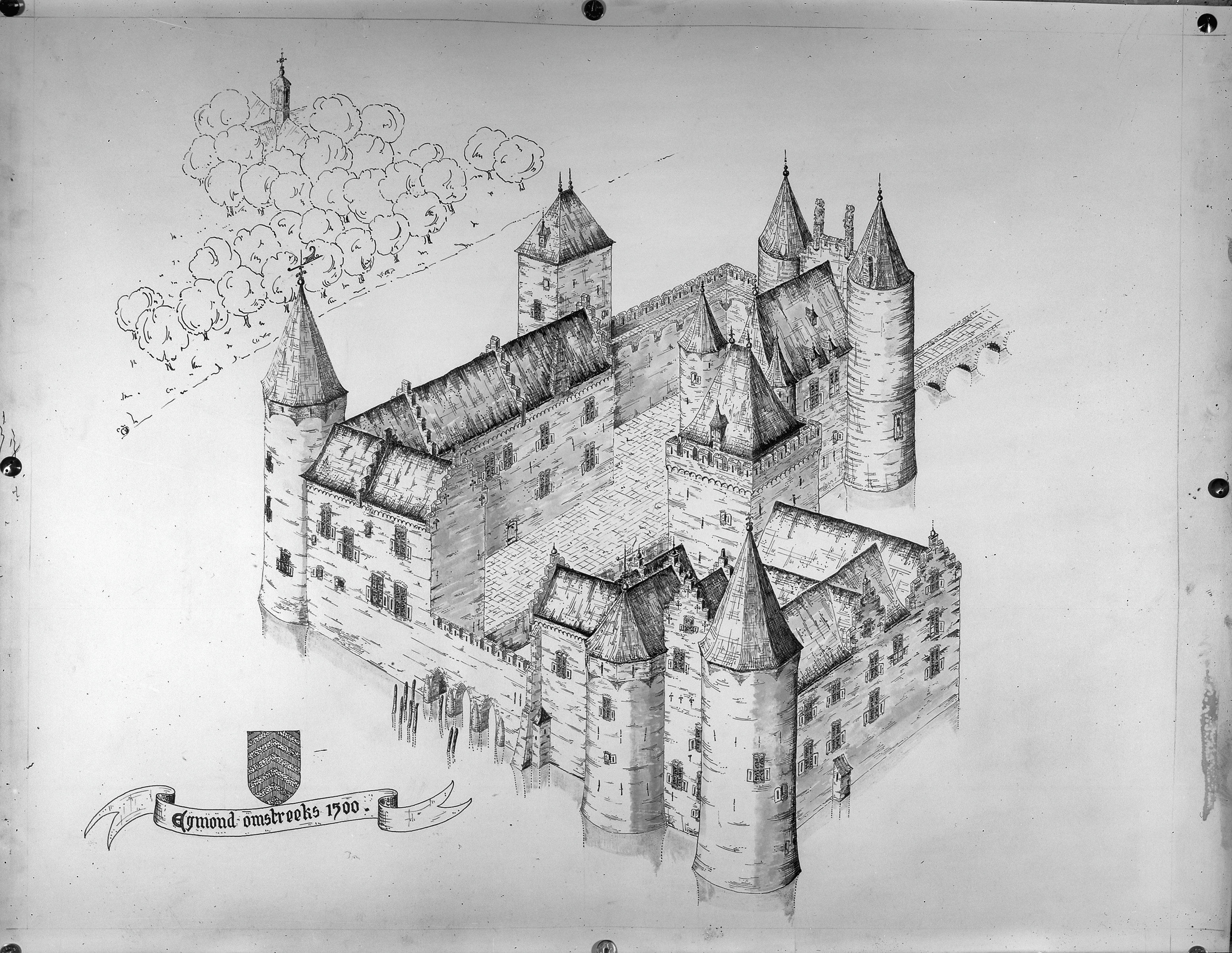 Kasteel: reconstructie toestand 1500